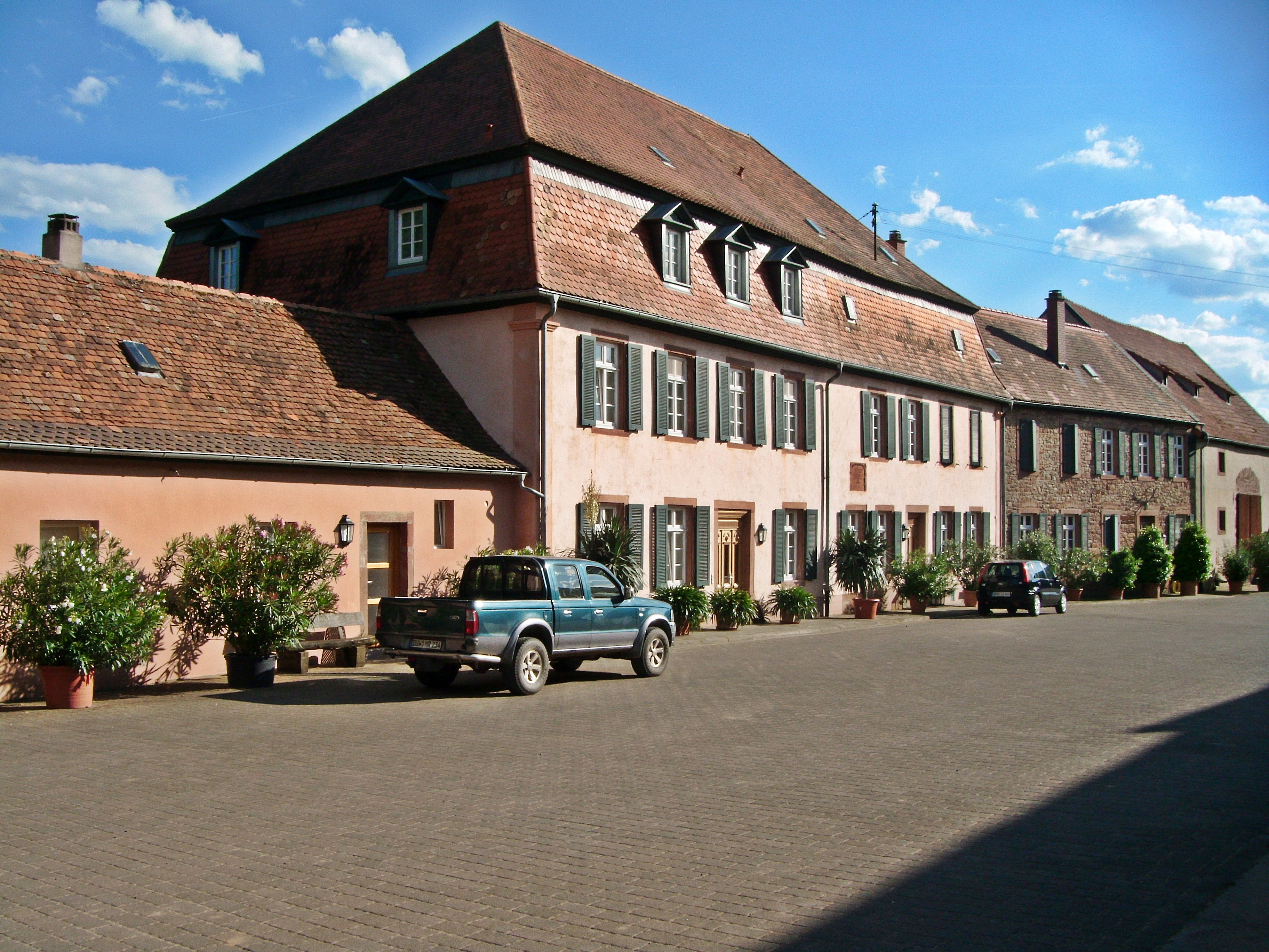 Quirnheim, Schlossgut, von der Hofseite aus (ehem. Hertlingshauser Hof)